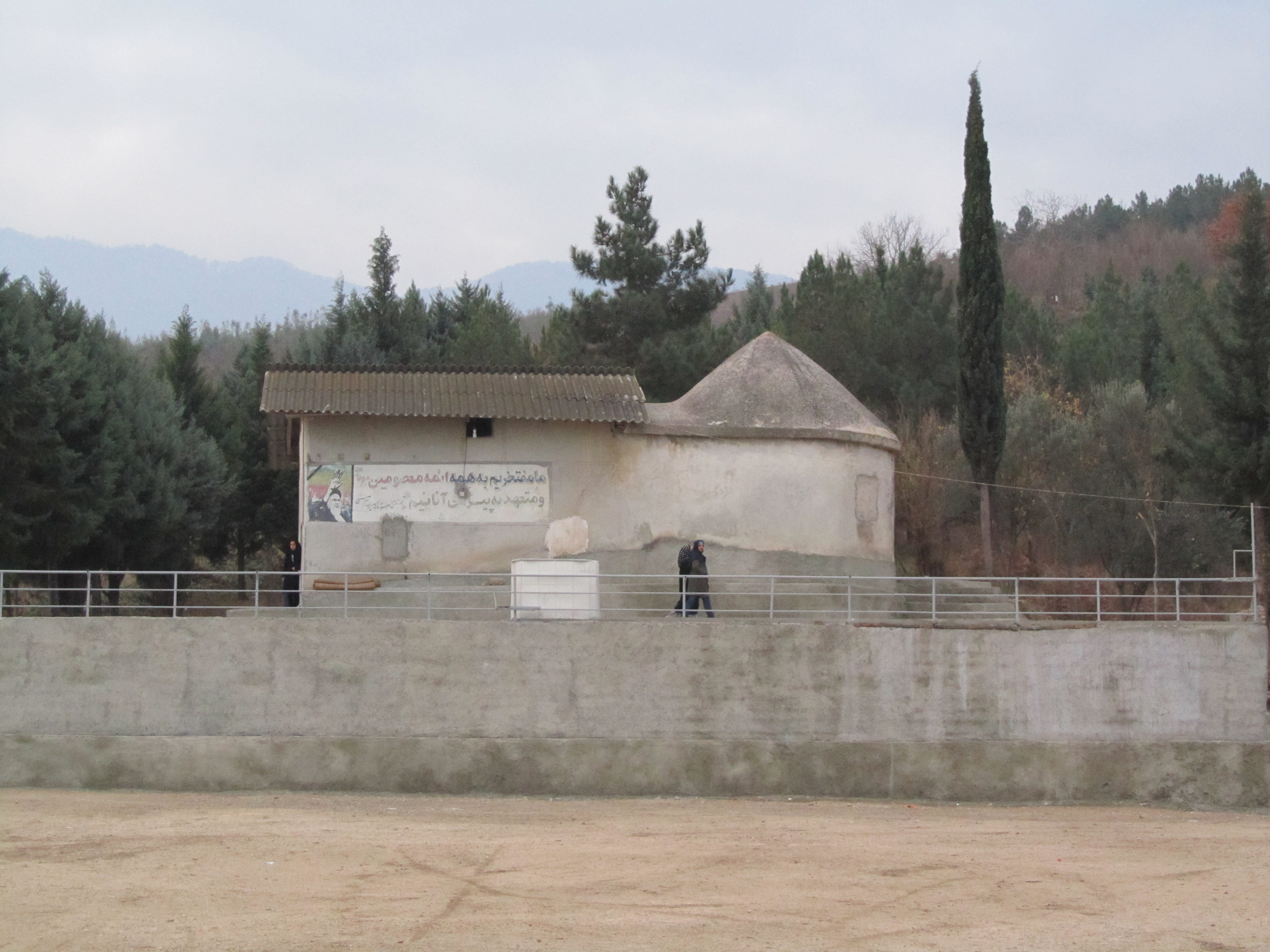 نمایی کامل از امام زاده هاشم روستای تیرتاش